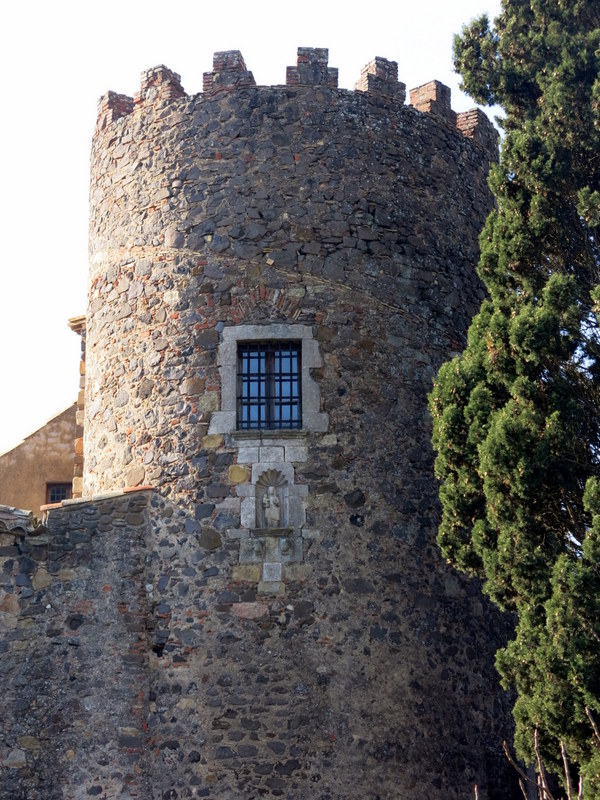 Castell de Cartellà a Maçanet de la Selva - Catalunya